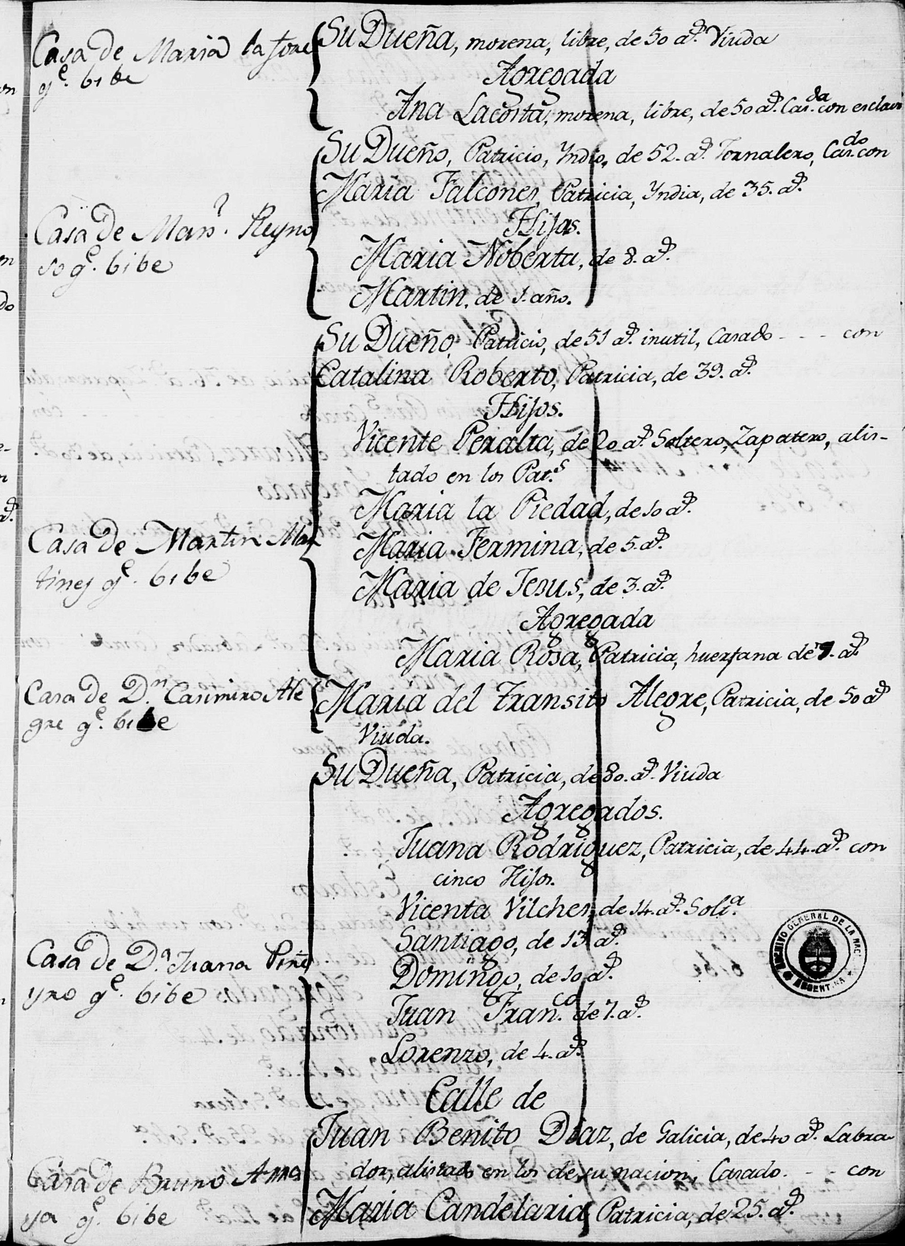 censo de 1806, familias de María del Tránsito Alegre, y Martín Martínez y Catalina Roberto.